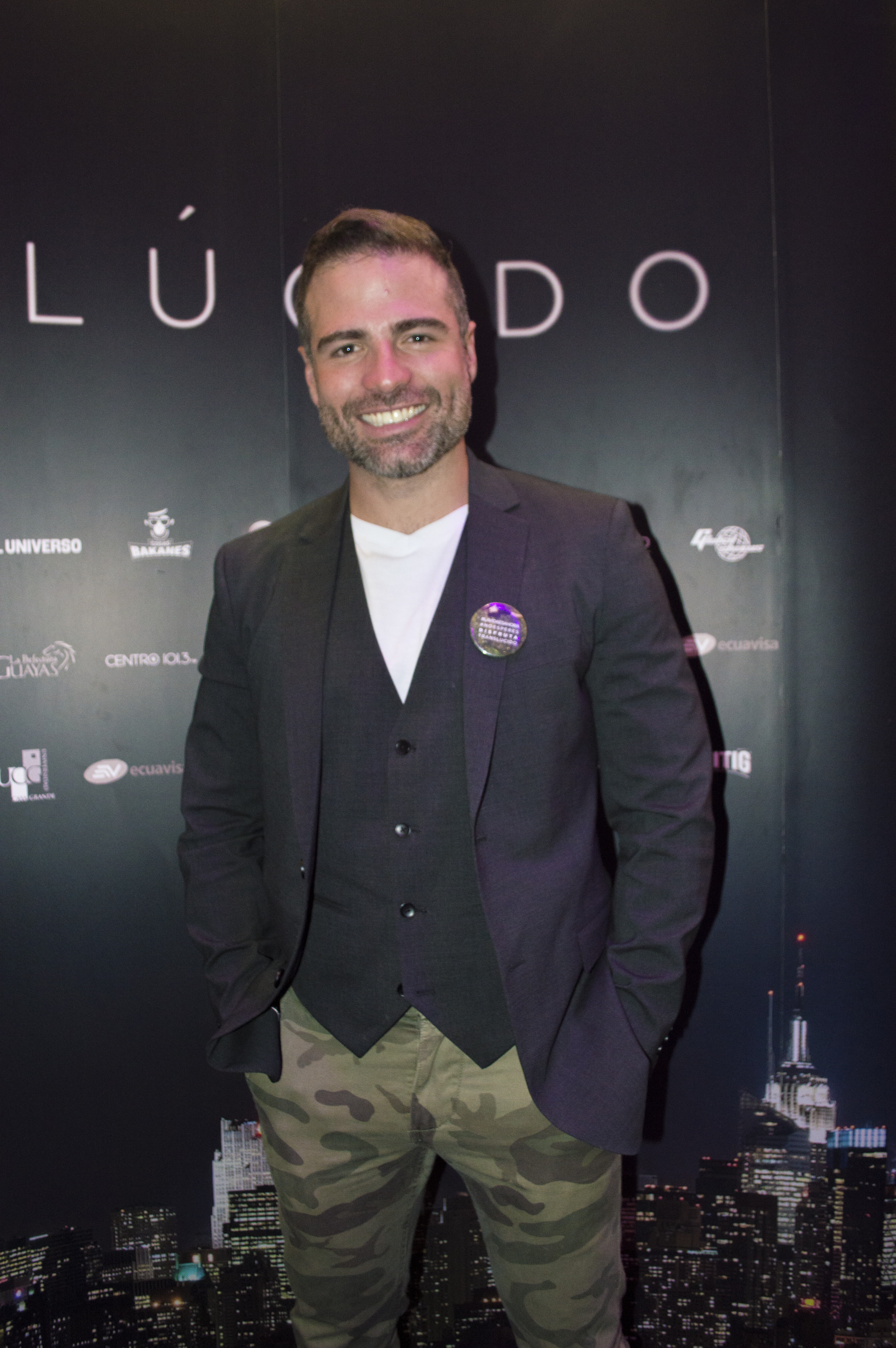 Roberto Manrique en el estreno de la película Translúcido protagonizada por él.